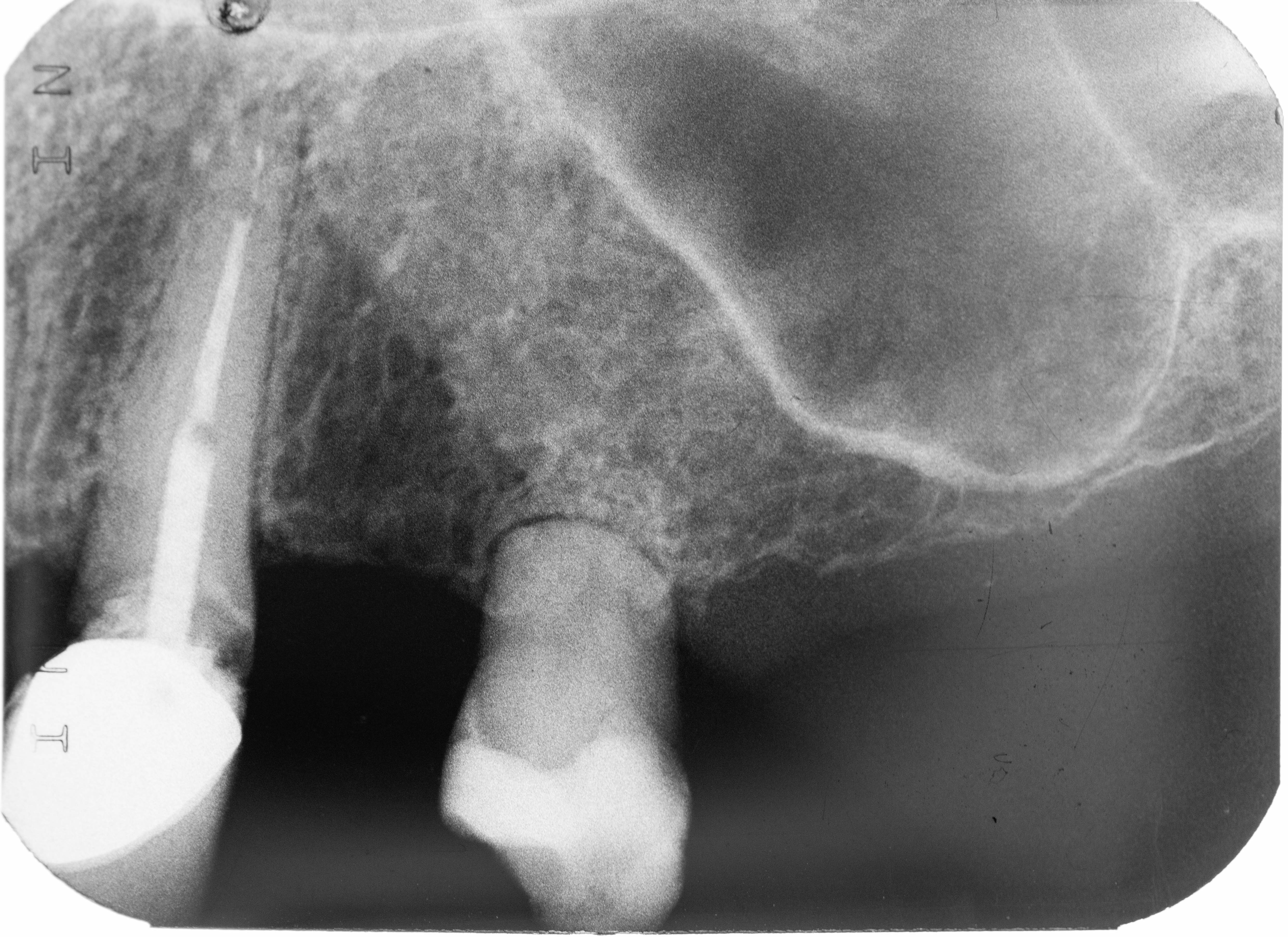 Wurzelresorption Zahn 25 und keilformiger Defekt